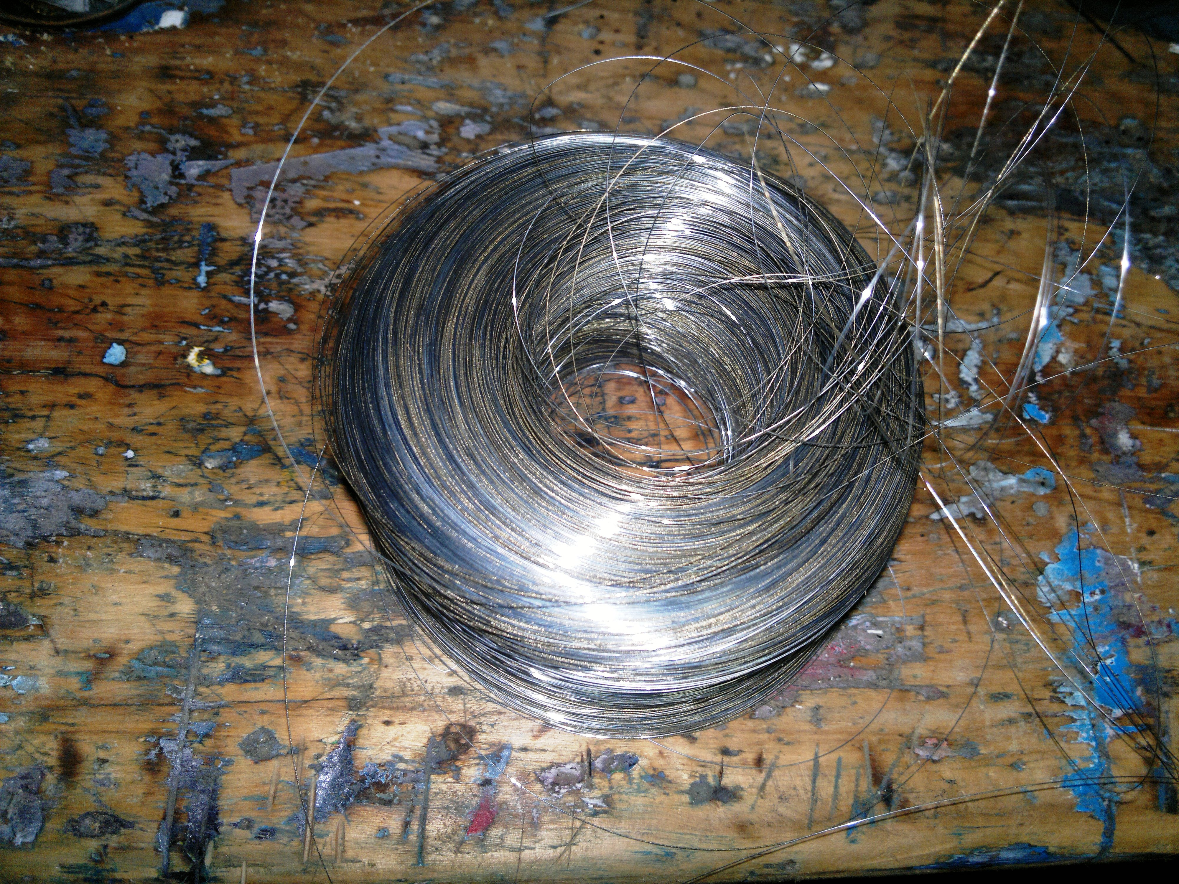 Fil residual en una màquina d'electroerosió per fil